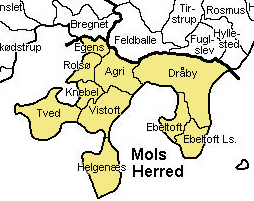 Mols Herred Randers Amt, Denmark Source: Map by Svend-Erik Christiansen